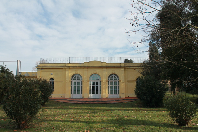 Foto alla Limonaia di Villa Carmignani